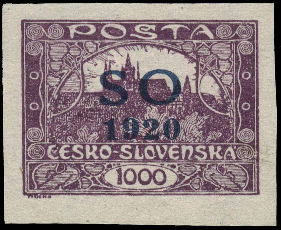 Почтовая марка для Восточной Силезии под контролем Чехословакии